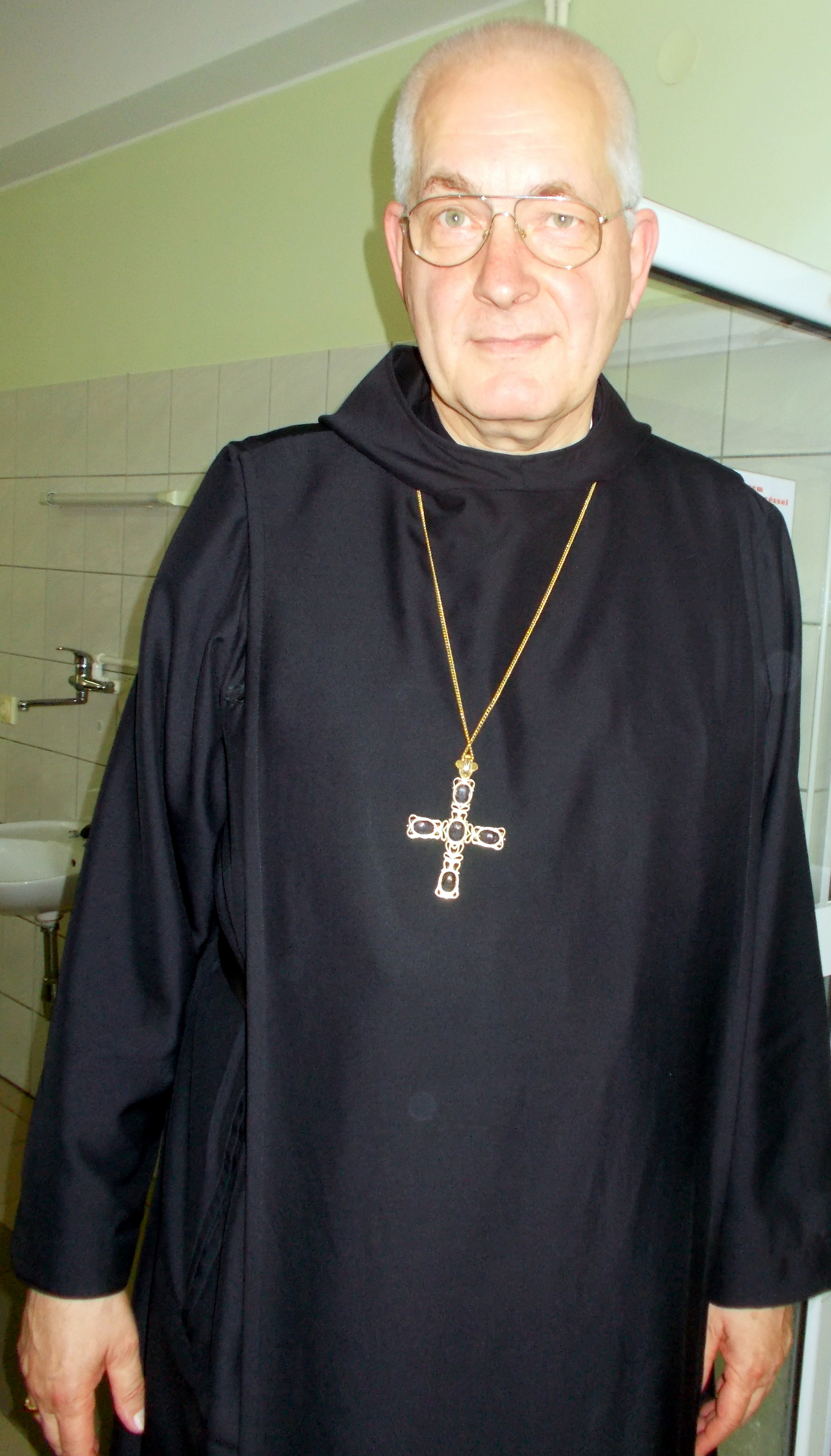 Franziskus Heereman abbey in Neuburg (Heidelberg)